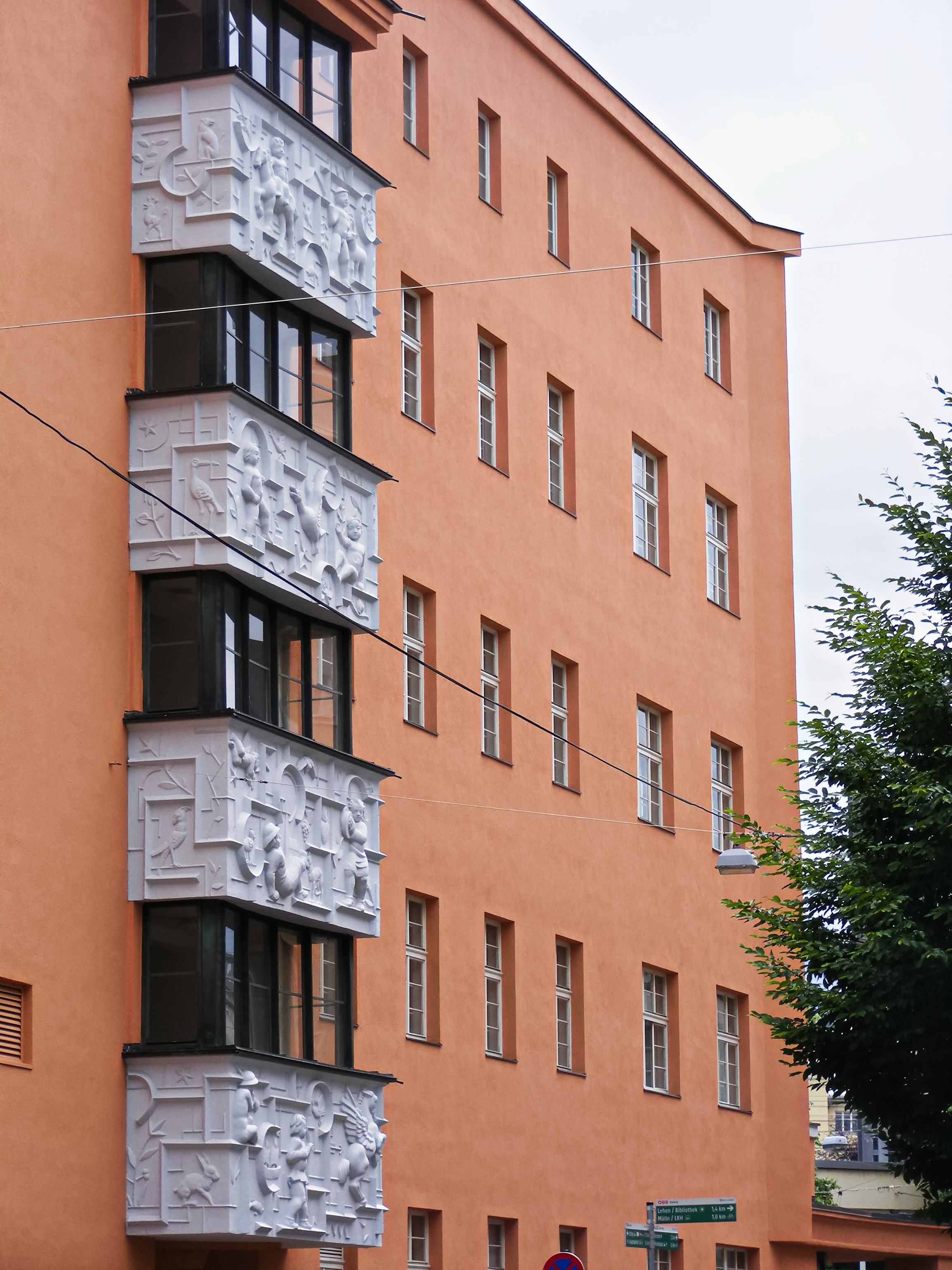 Balkone Auf der Elisabethstraßen-Seite des sogenannten Kiesel-Gebäudes im Salzburger Stadtteil Elisabeth-Vorstadt